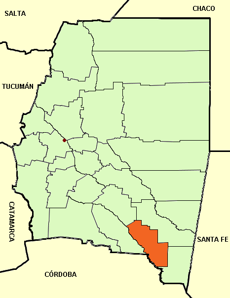 Mapa editado de: Santiago del Estero province (Argentina), departments and capital.png